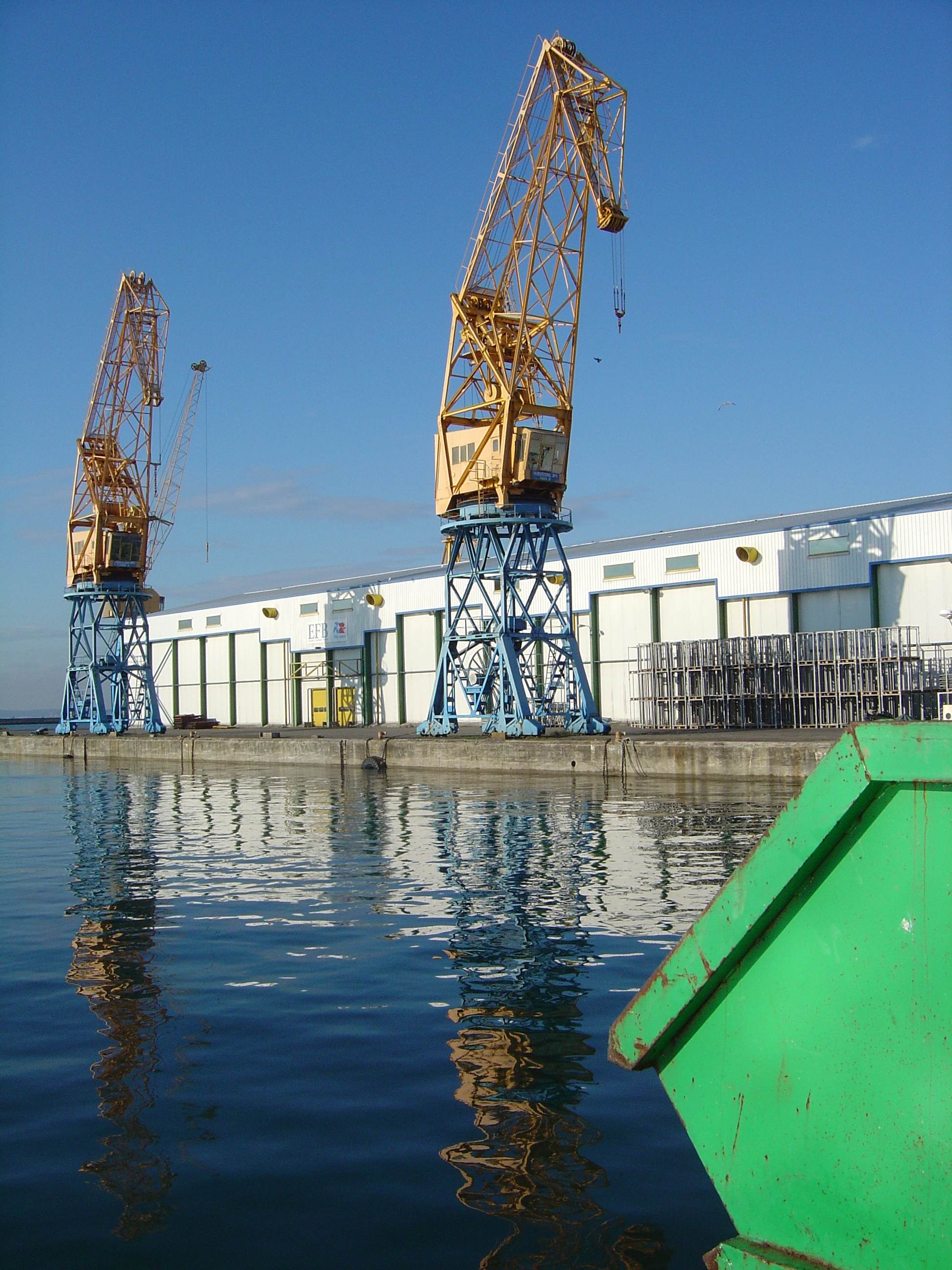 Grues dans le port de commerce de Brest